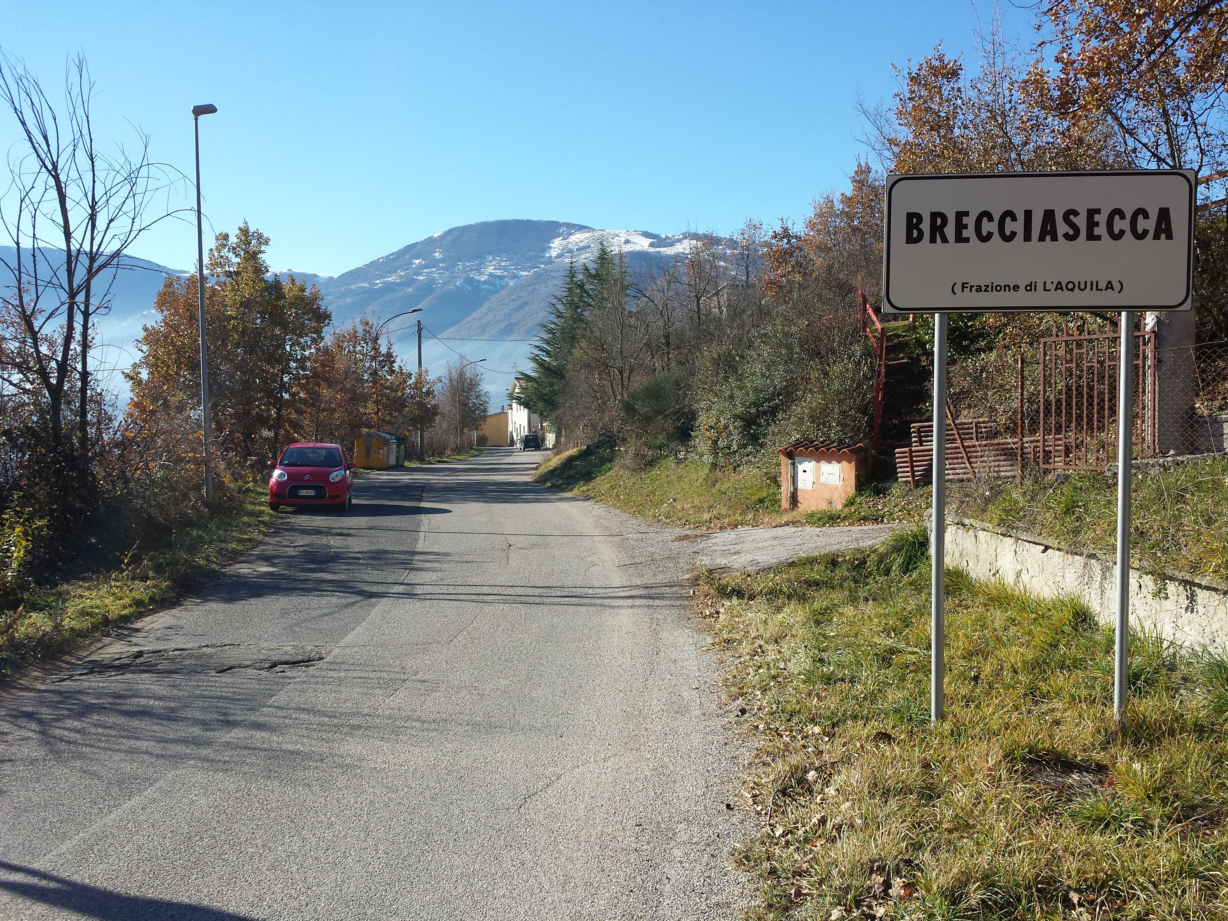 Sassa (L'Aquila)